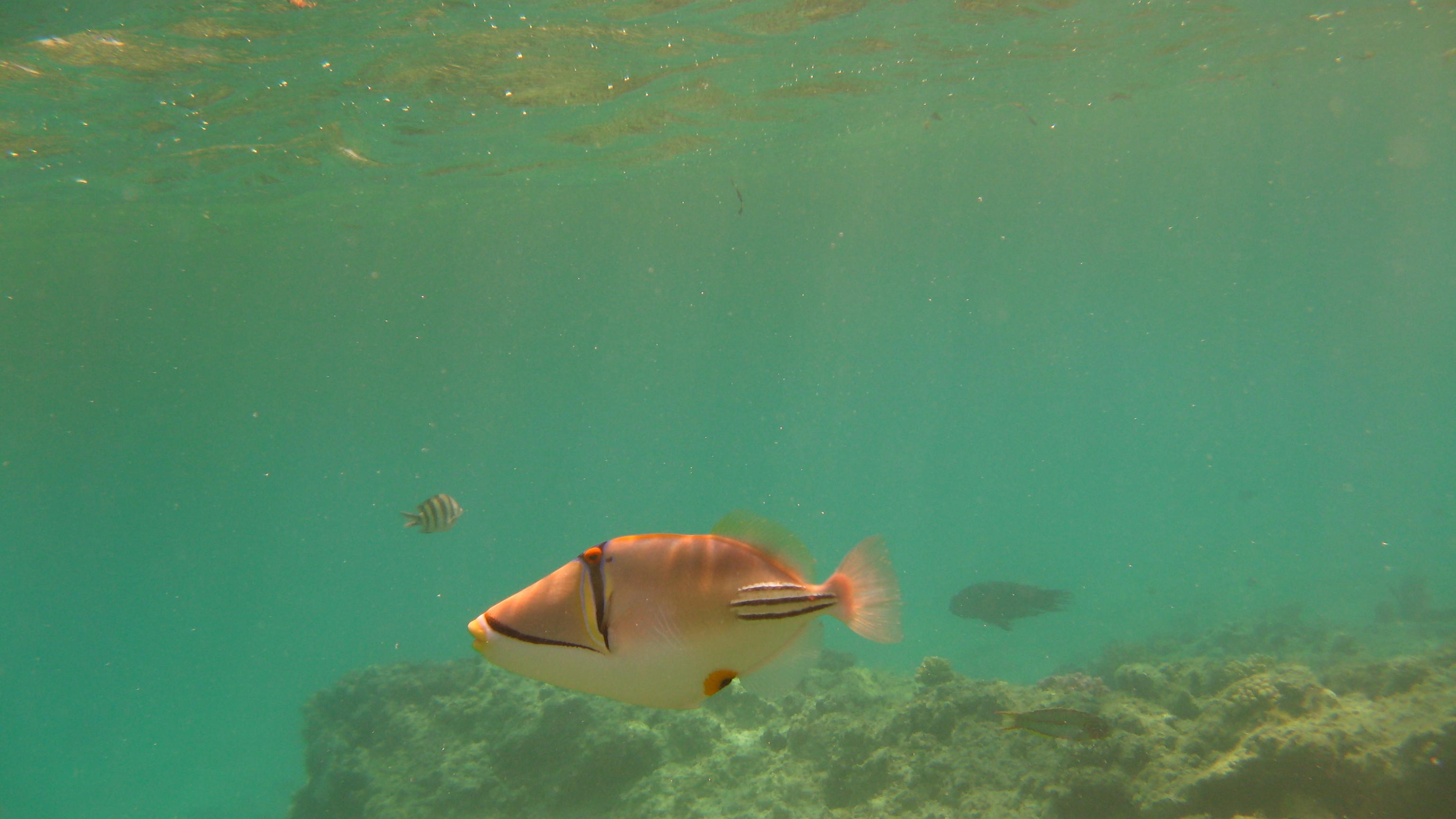 Rotmeerpicassodrücker (Rhinecantus assasi)